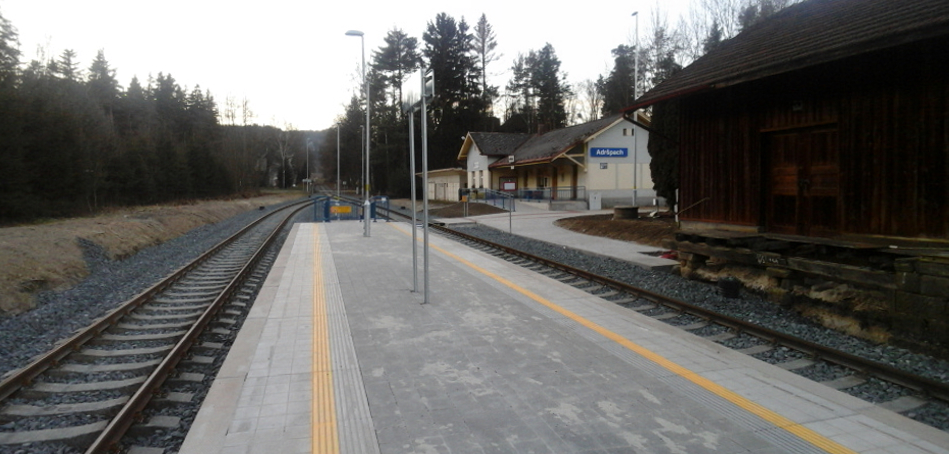 Stav nádraží v Dolním Adršpachu po rekonstrukci v roce 2015.